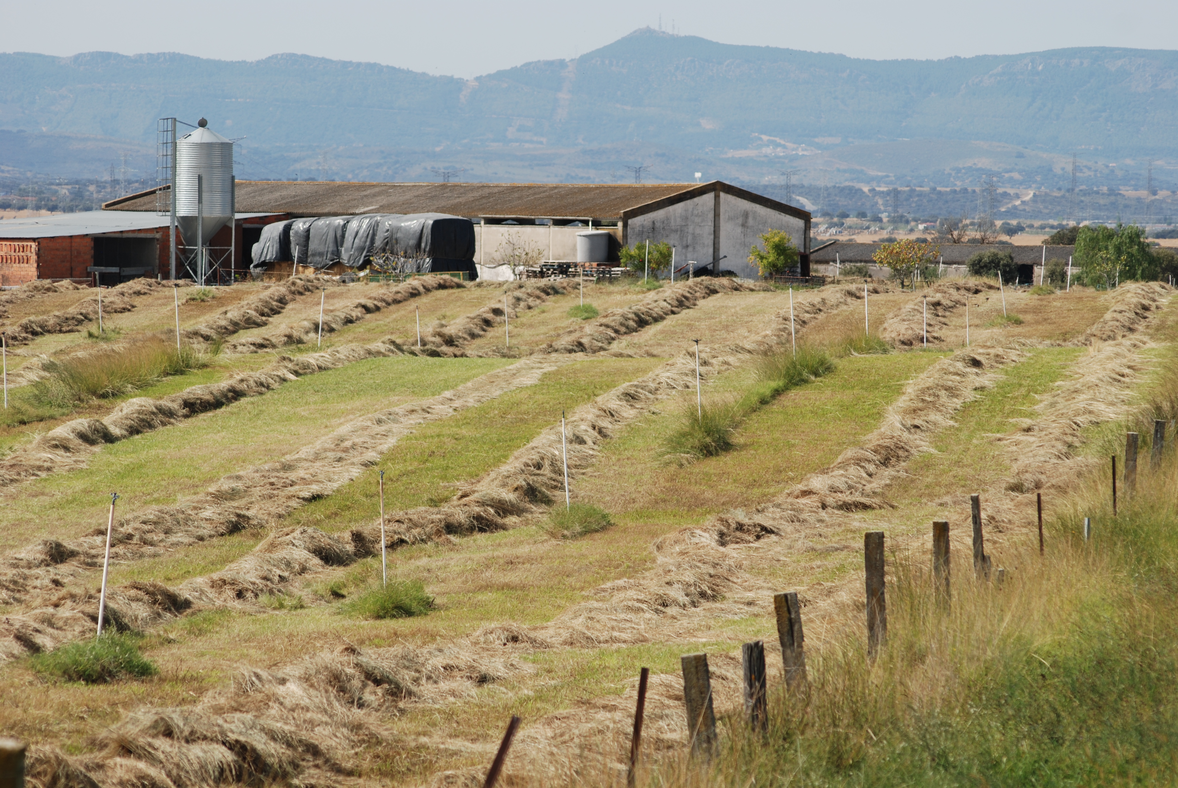 Heno segado (Saucedilla)